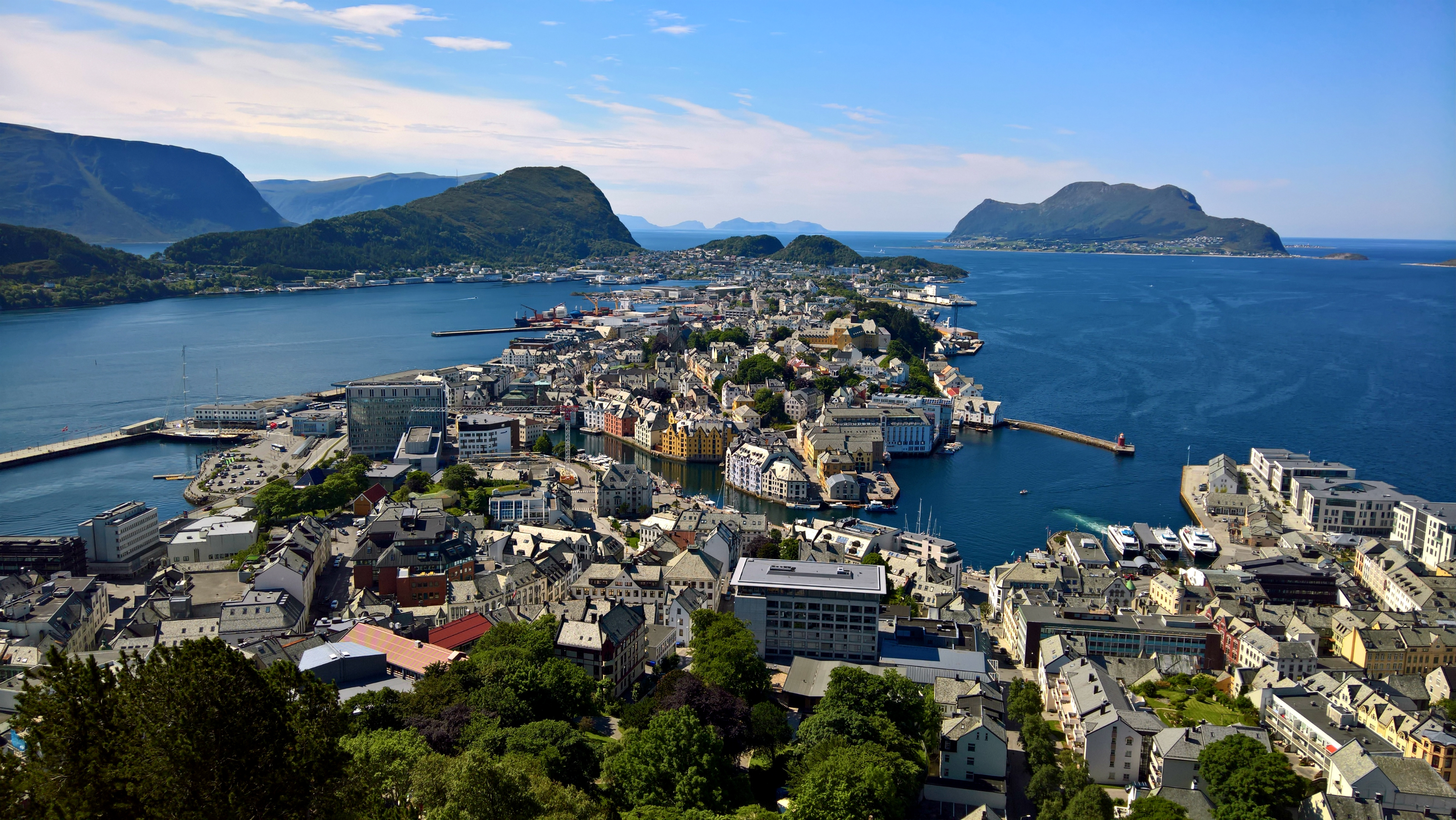 Sommerbilde av Ålesund